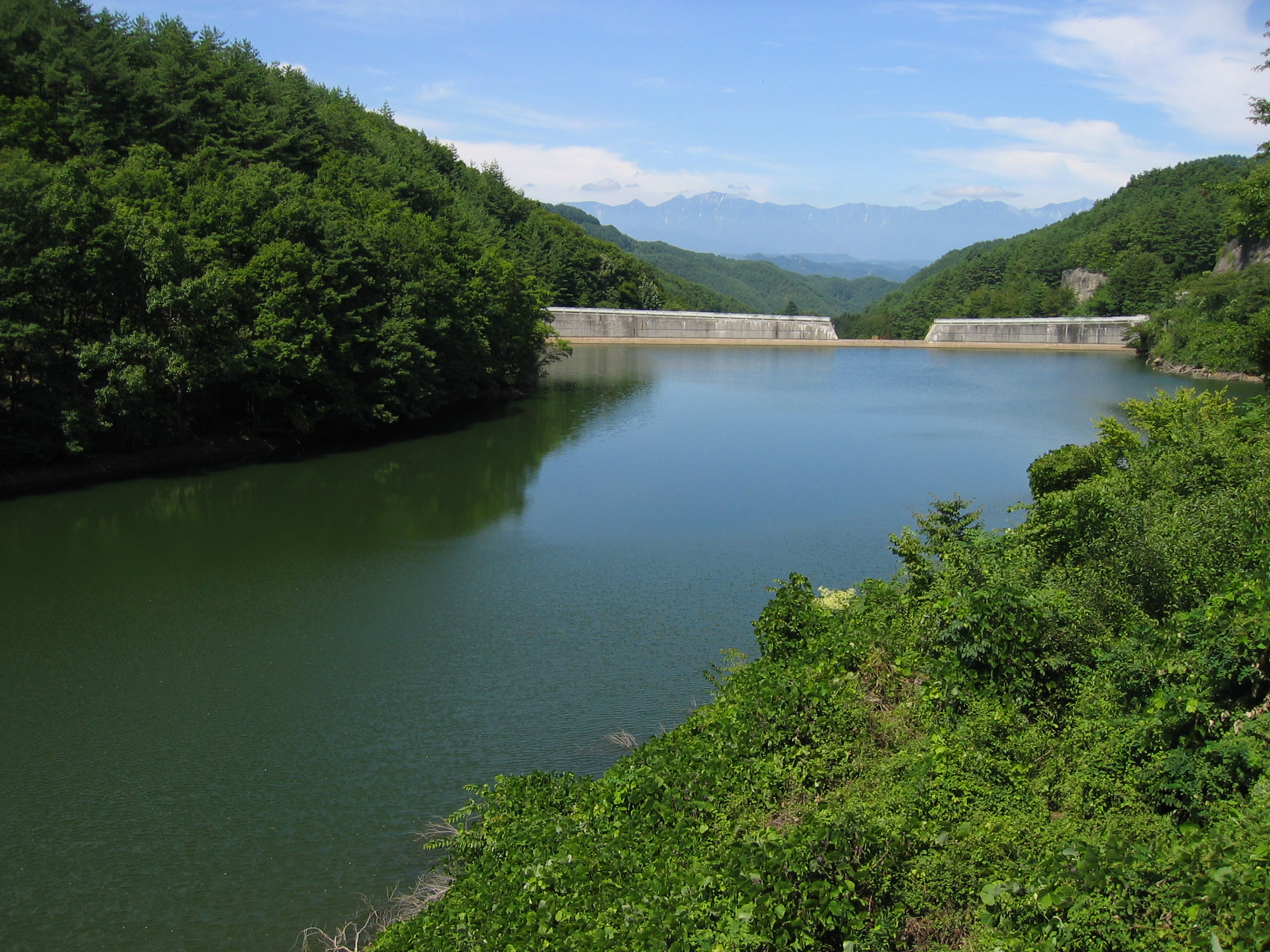 Higashijo Dam (東条ダム) makes a lake.